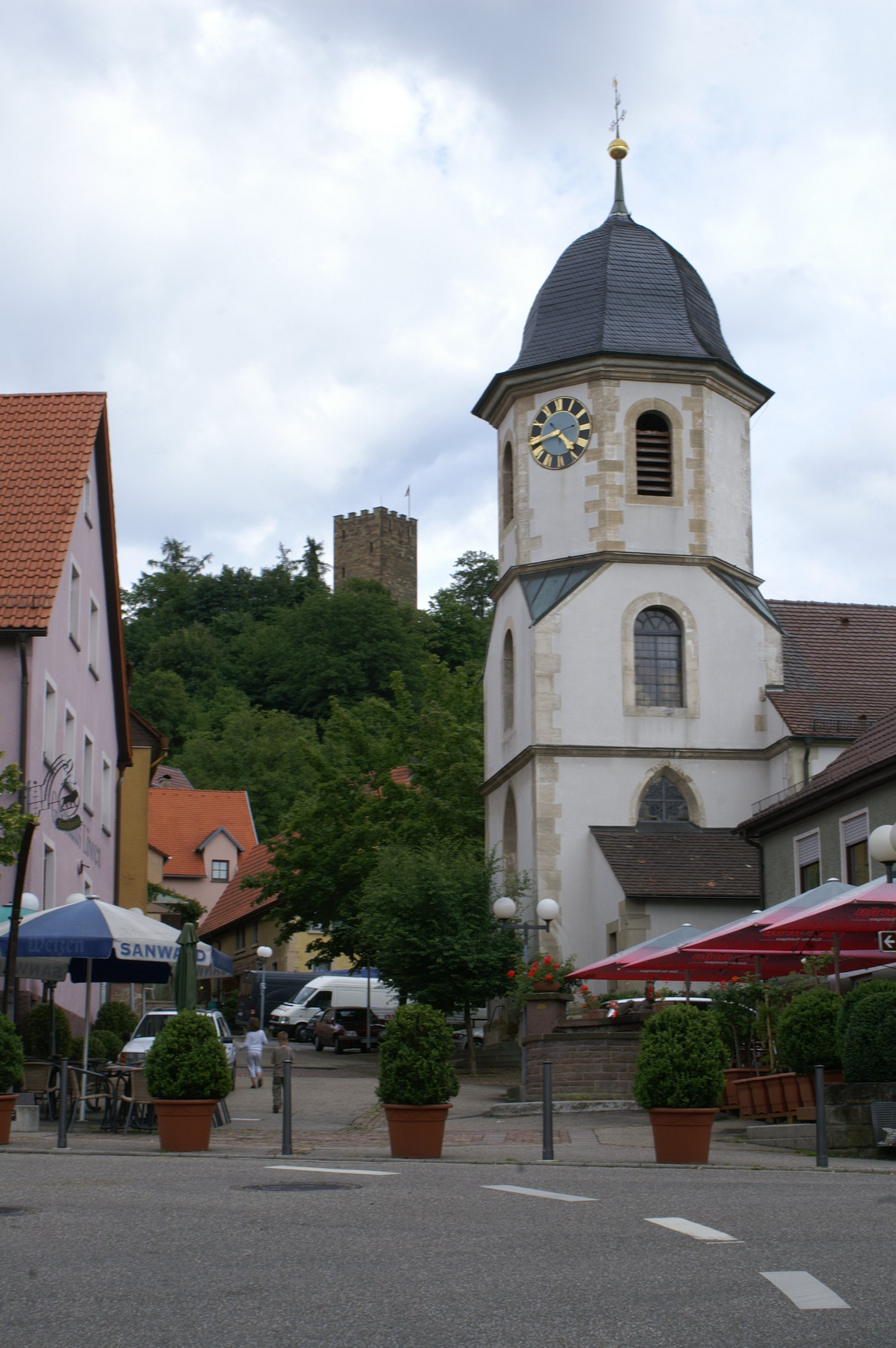 Ortsmitte von Sternenfels im Enzkreis, im Hintergrund der Schloßbergturm